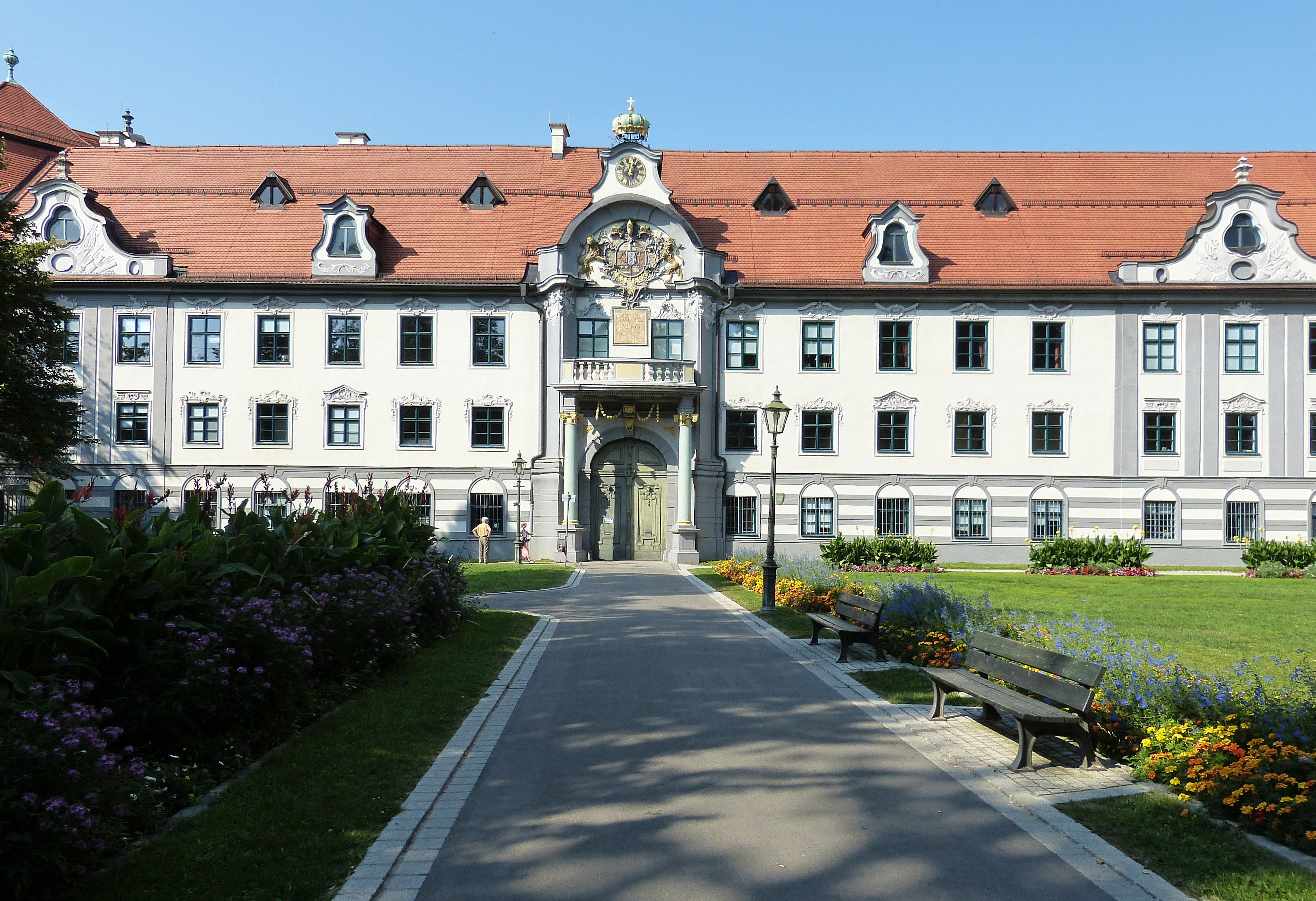 Augsburg, Fronhof, Mitteltrakt der Fürstbischöflichen Residenz.